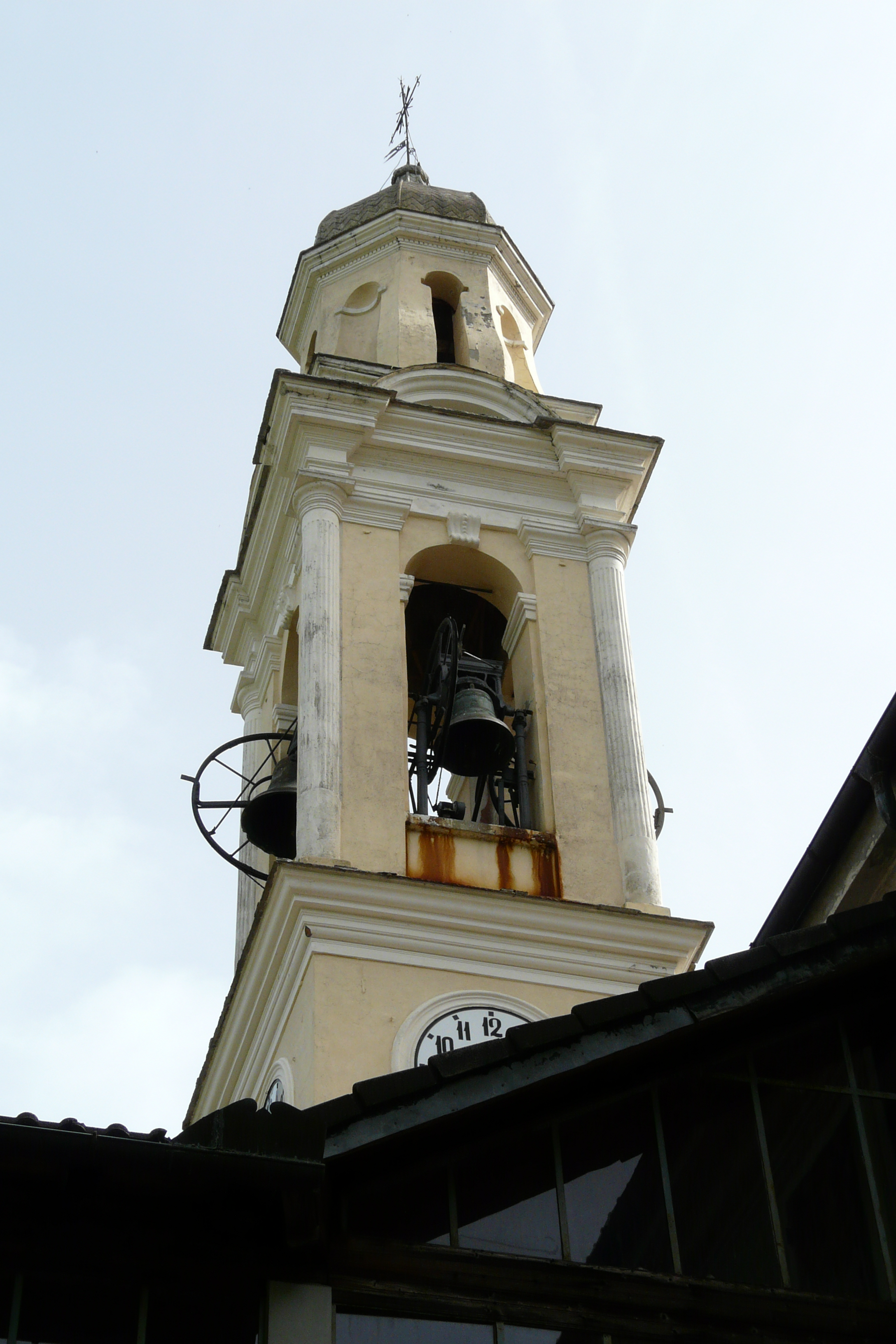 Campanile della Chiesa di Vallenzona, Vobbia, Liguria, Italia